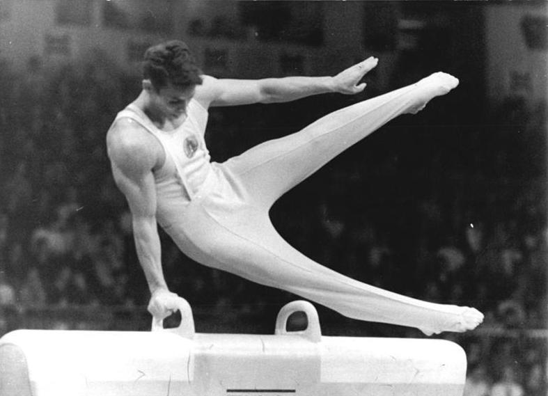 ADN-ZB-Schaar-25.10.70-ma-Ljubljana (Jugoslawien):XVII. Weltmeisterschaften im Turnen- Nach der Pflicht der Männer (am 24.10.70) liegt die DDR-Mannschaft auf dem dritten Platz. Hier DDR-Meister Klaus Köste am Seitpferd. Mit 55,40 Punkten ist er nach der Pflicht Dreizehnter im Weltklassefeld der 154 Teilnehmer aus 34 Ländern.